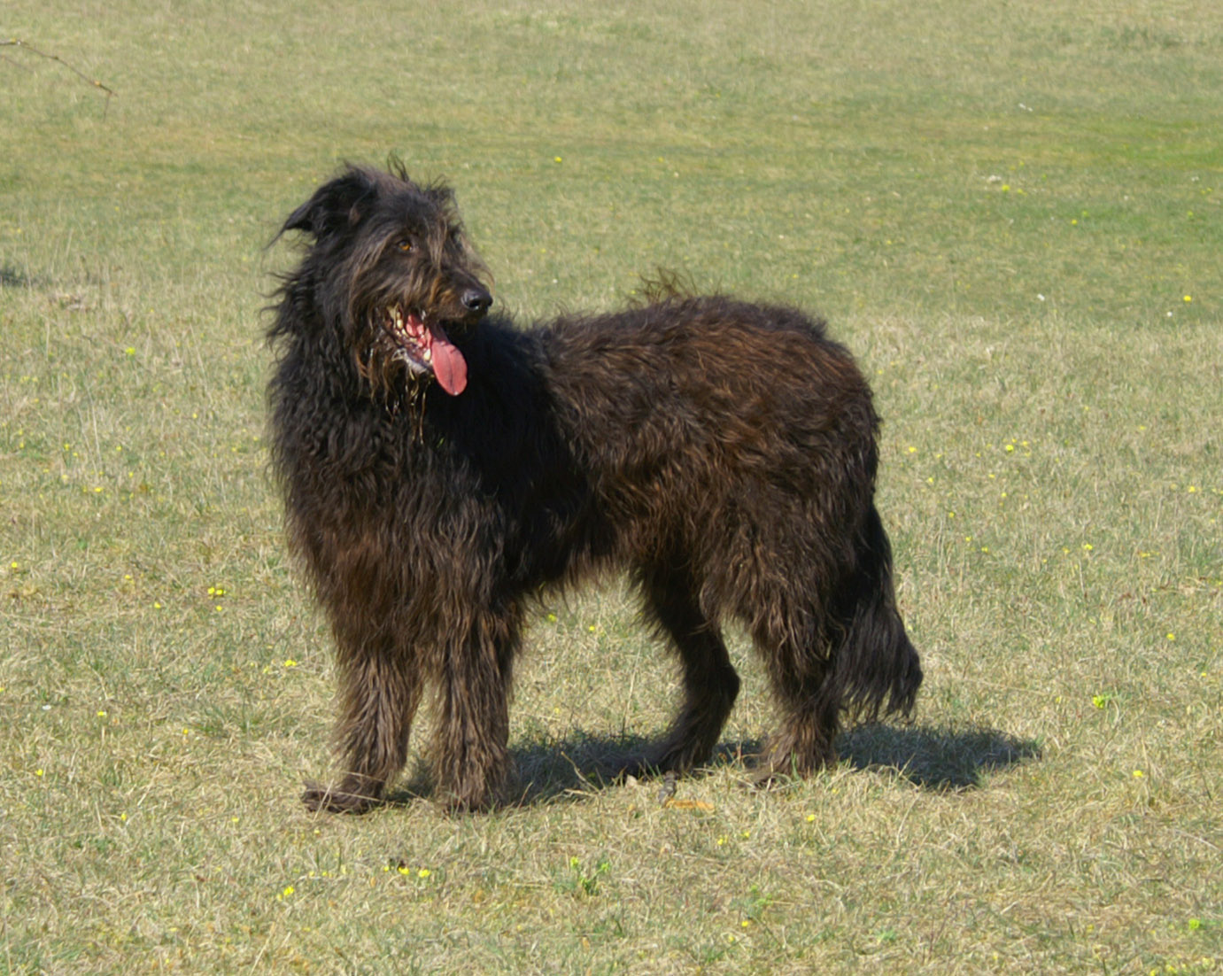 Altdeutscher Hütehund - Strobel